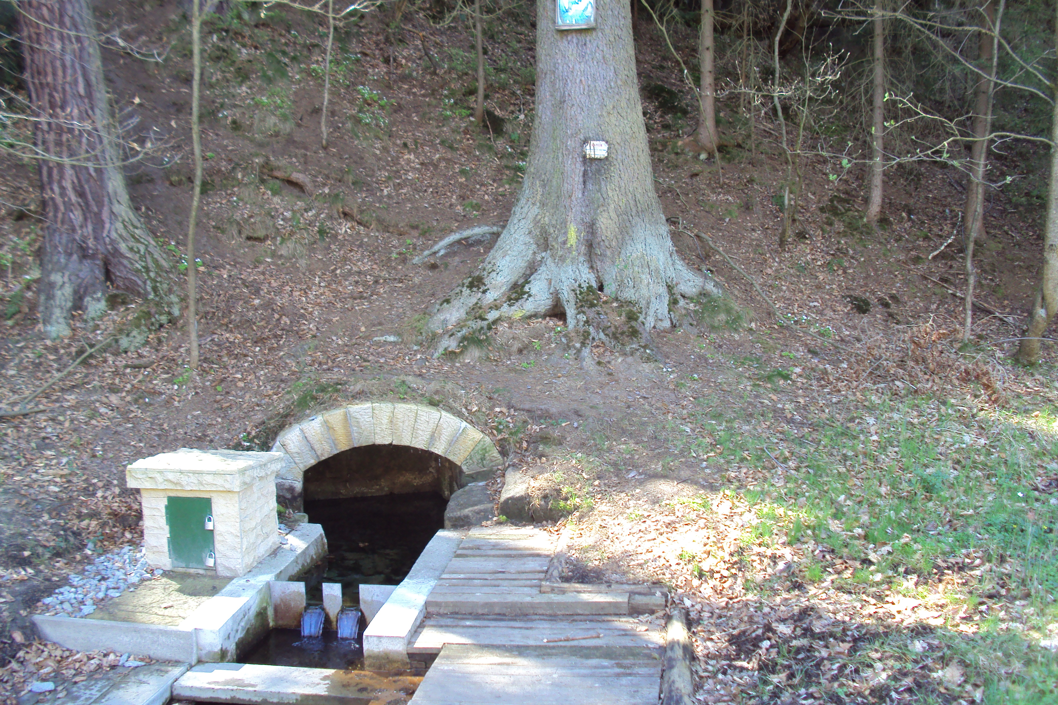 Pramen u silnice v obci Loubí